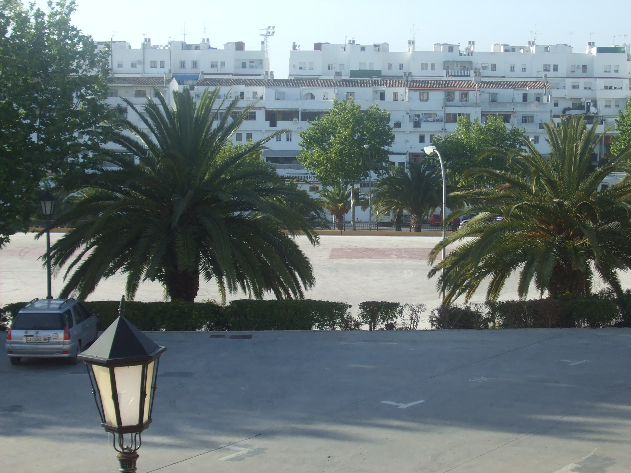 Urbanización de Los Olivillos y Recinto Ferial El Ejido. San Roque, España.